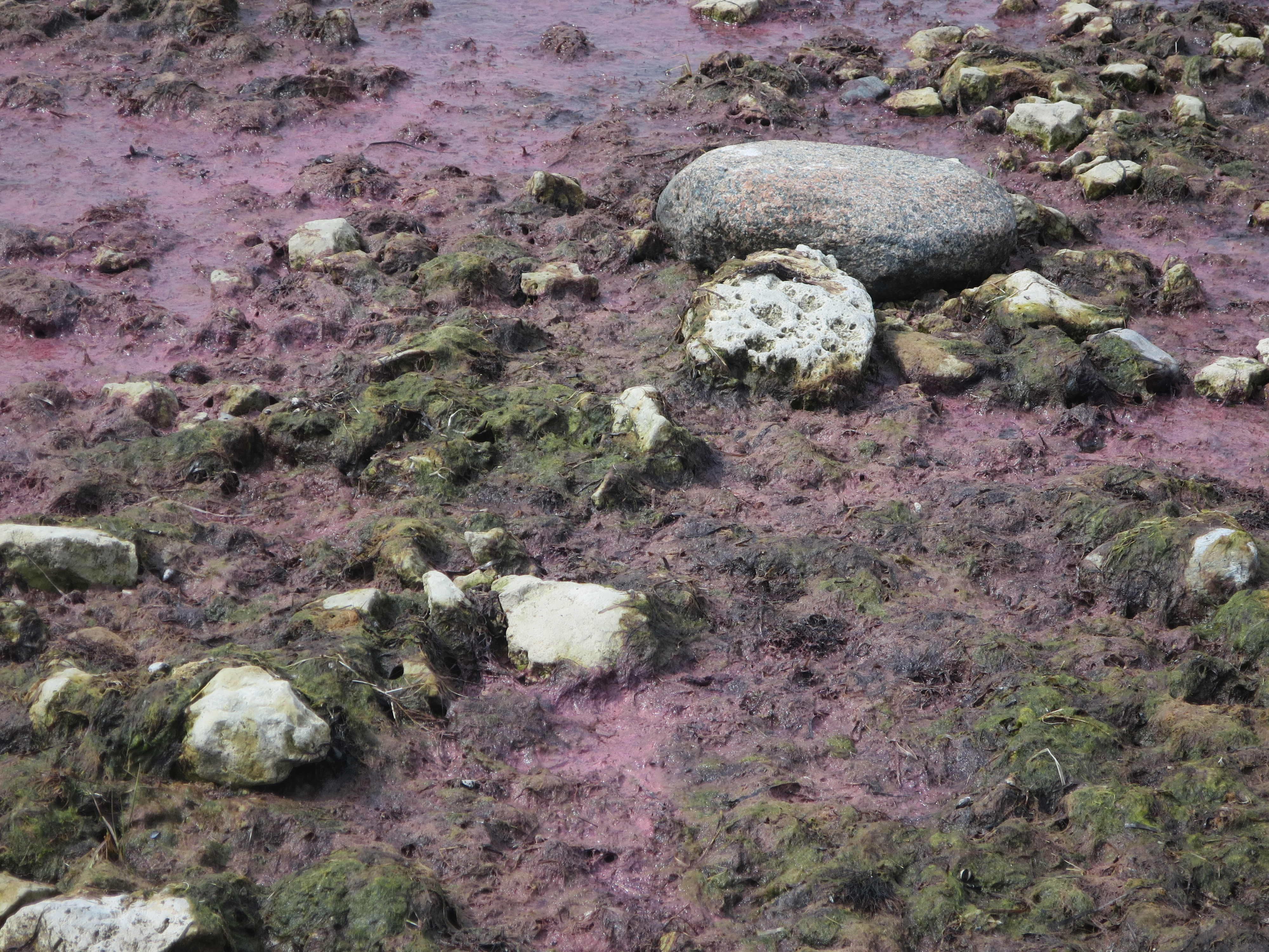 Rote Sandablagerungen am Meer